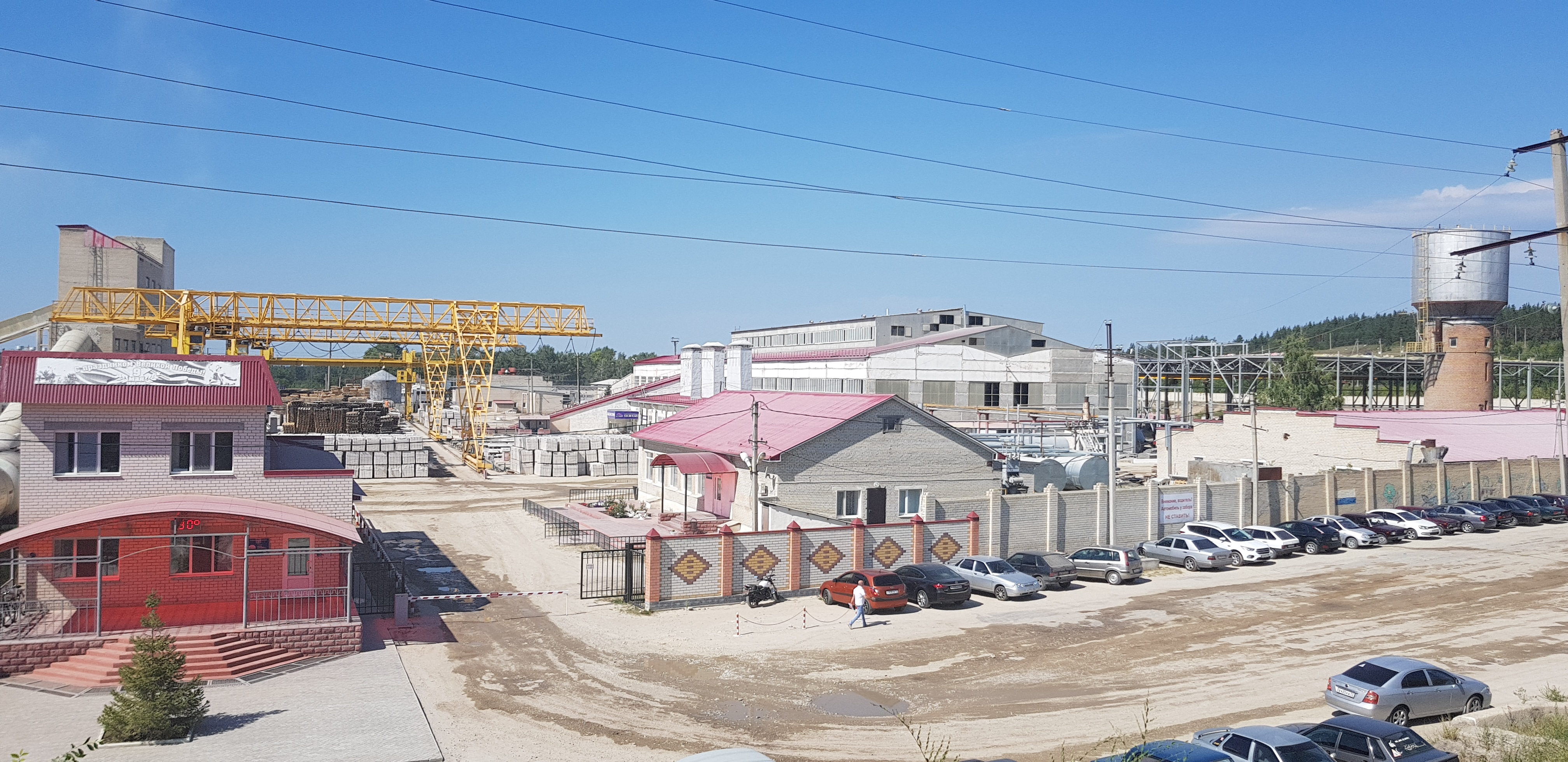 Завод по производству силикатного кирпича ООО "Силикат"